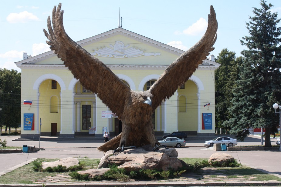 Орел перед ЖД вокзалом г. Орла